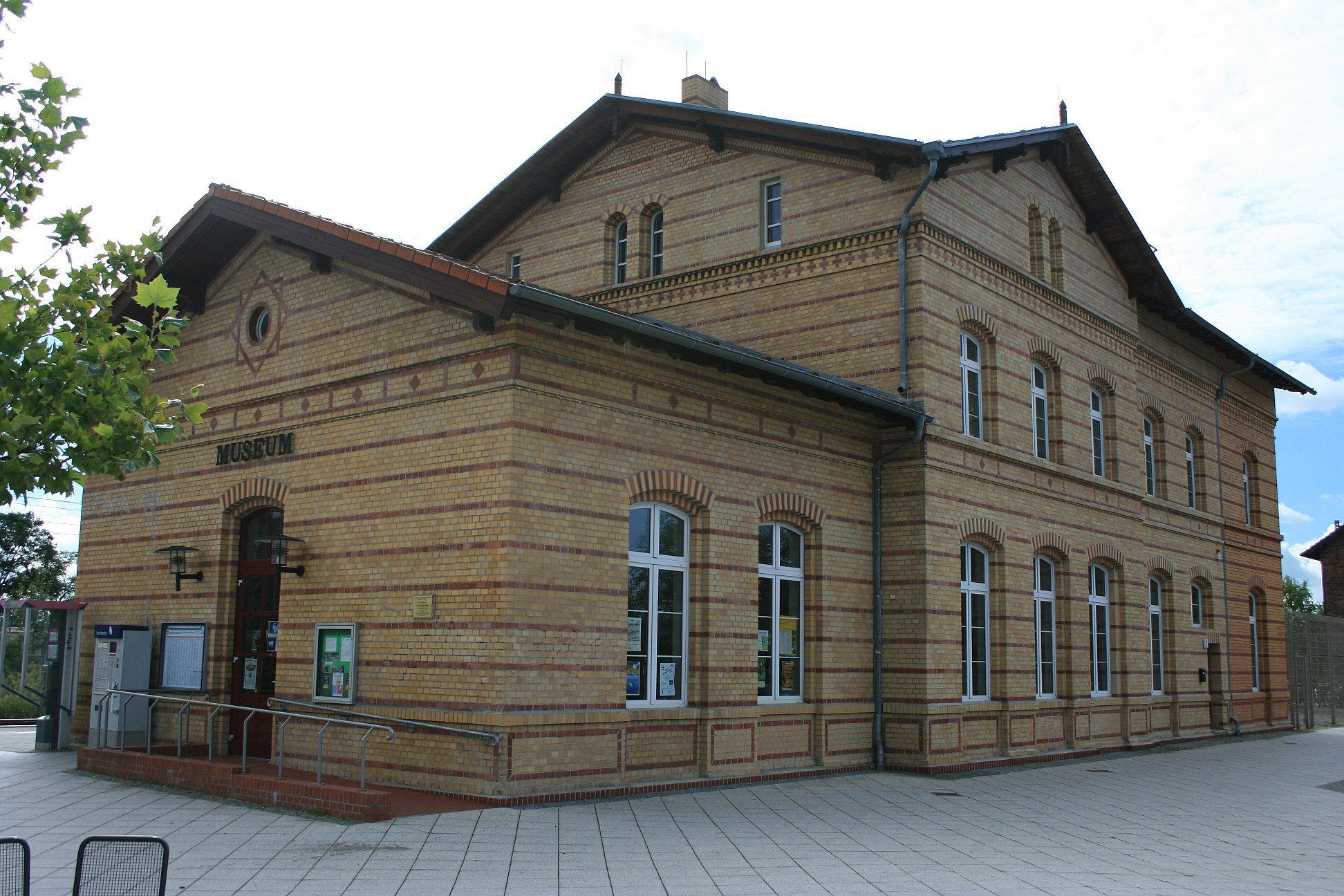 Bahnhof Ludwigsfelde, Brandenburg